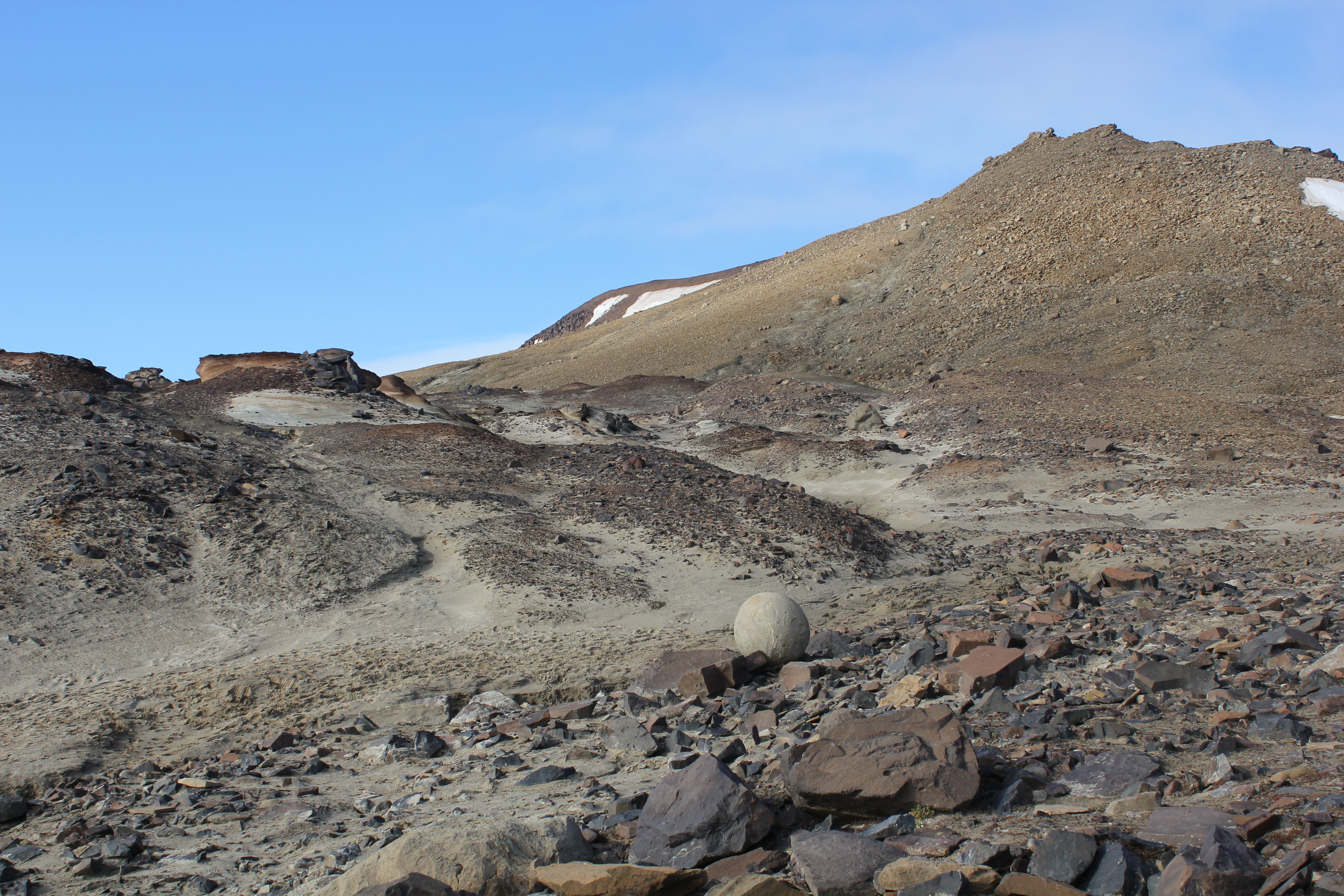 Комплексный заказник Земля Франца-Иосифа: Архангельск,Приморский район, Архангельская область This image is related to the protected area of Russia number 2930163